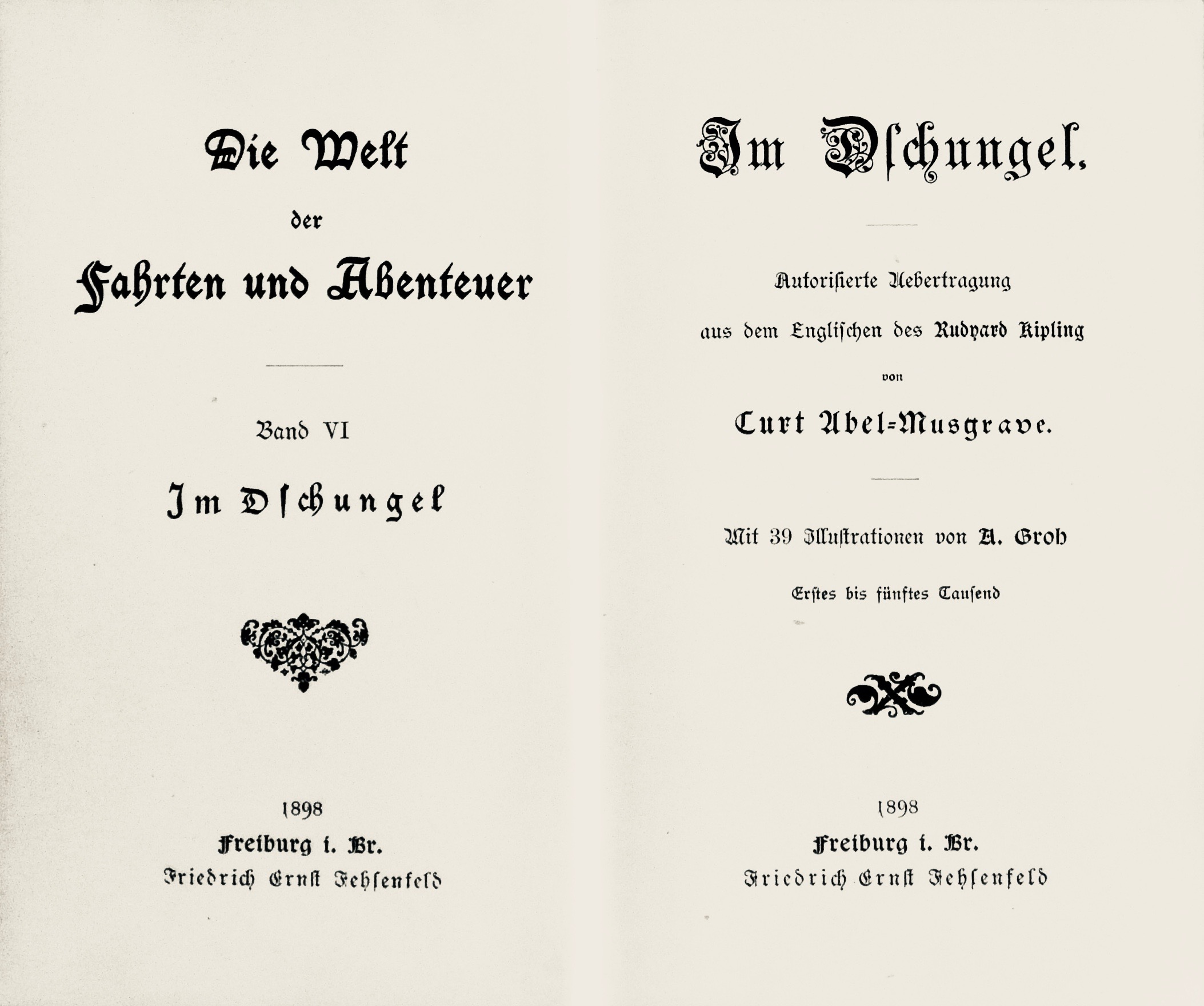 Rudyard Kipling; Curt Abel-Musgrave (translater): In de Jungle, Uitgeverij Friedrich Ernst Fehsenfeld, Freiburg im Breisgau 1898